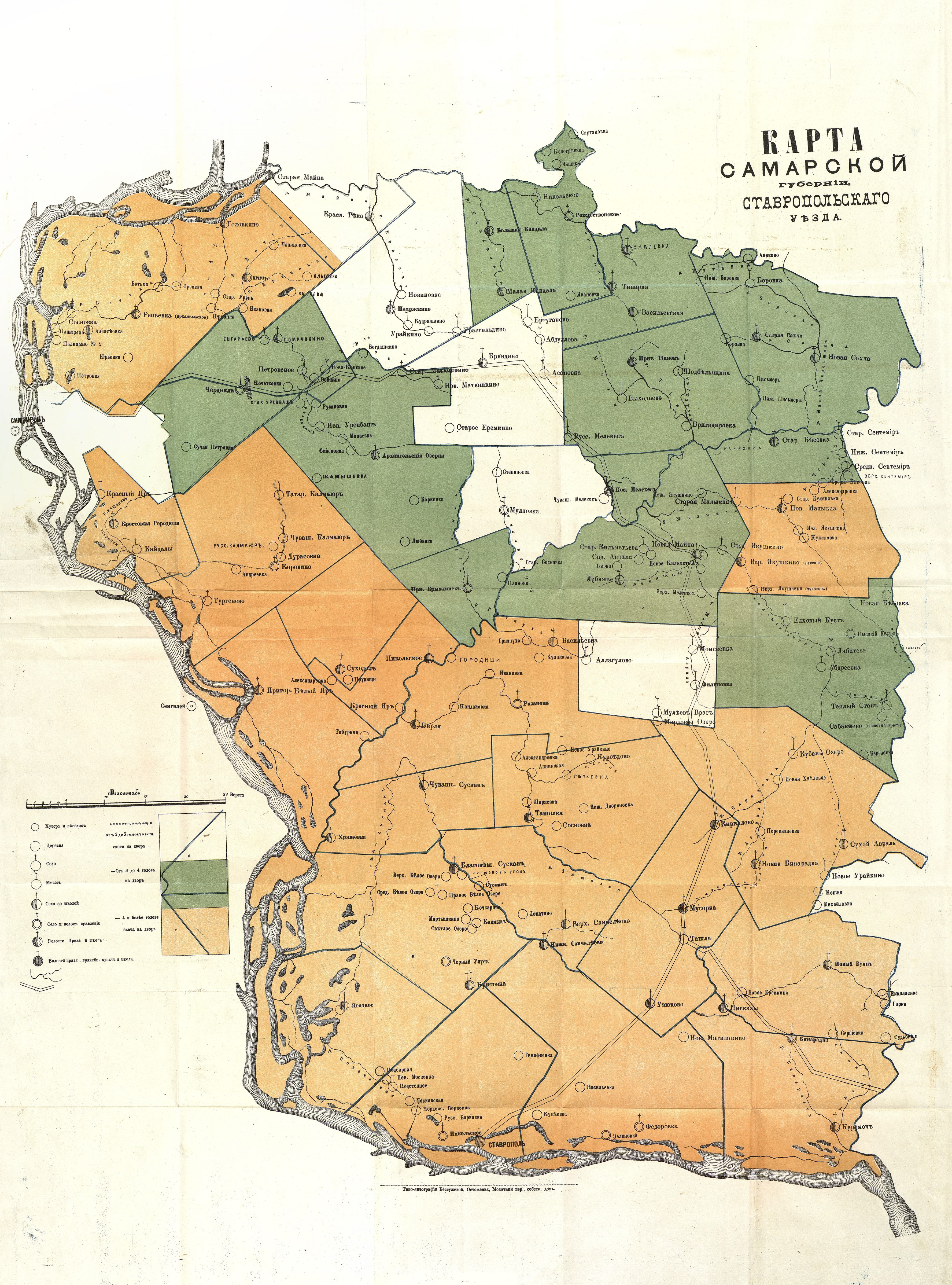 Карта Ставропольского уезда Самарской губернии, 1884